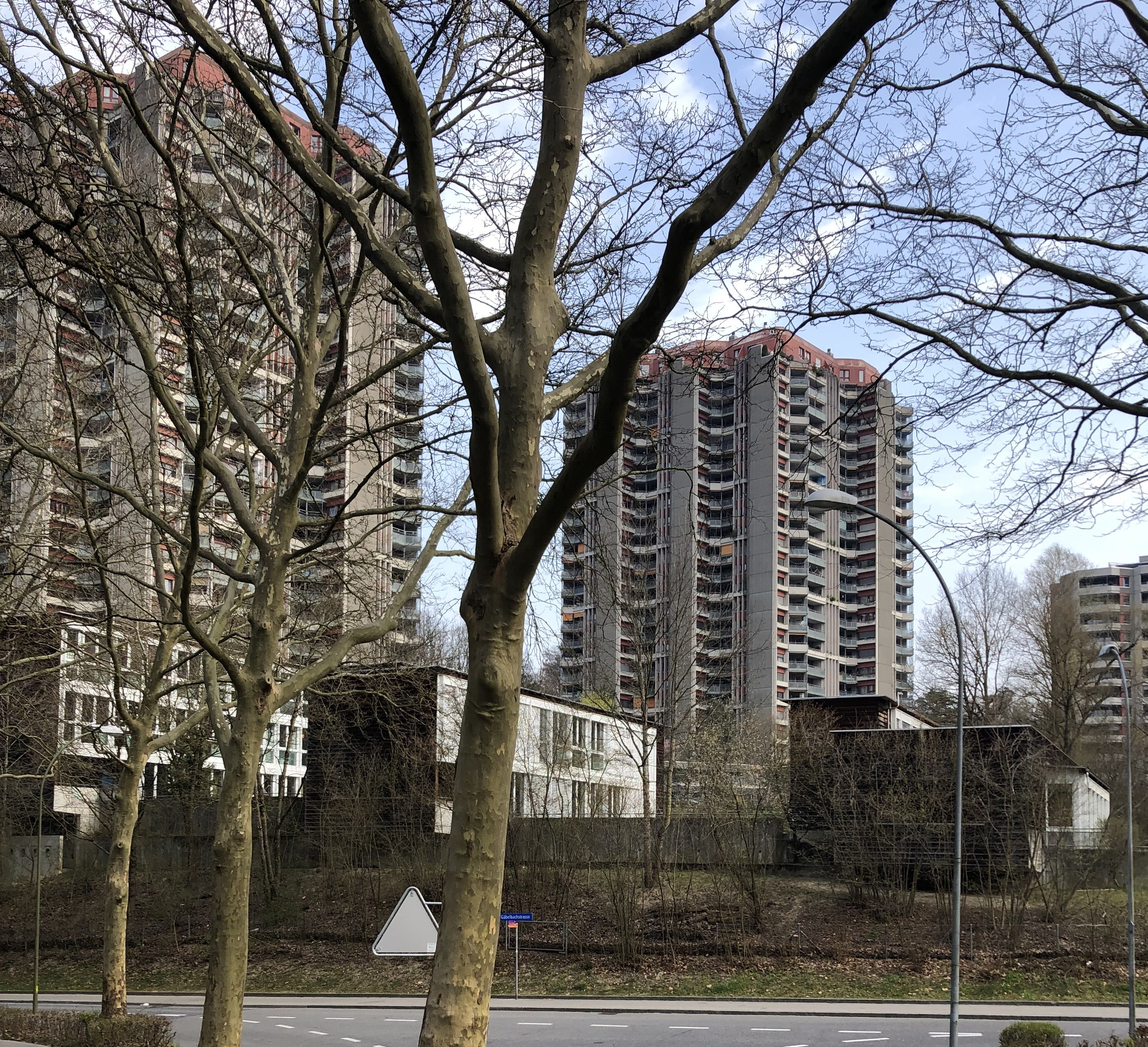 Holenacker Hochhausblick von Gäbelbach aus